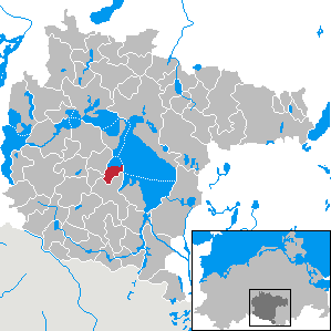 Gotthun in Mecklenburg-Western Pomerania - District Müritz